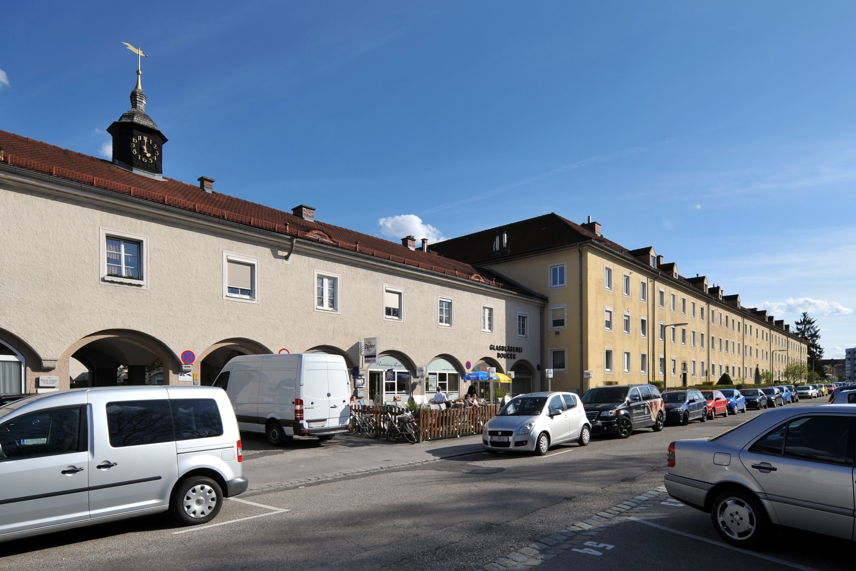 Harbachsiedlung 1. Teil